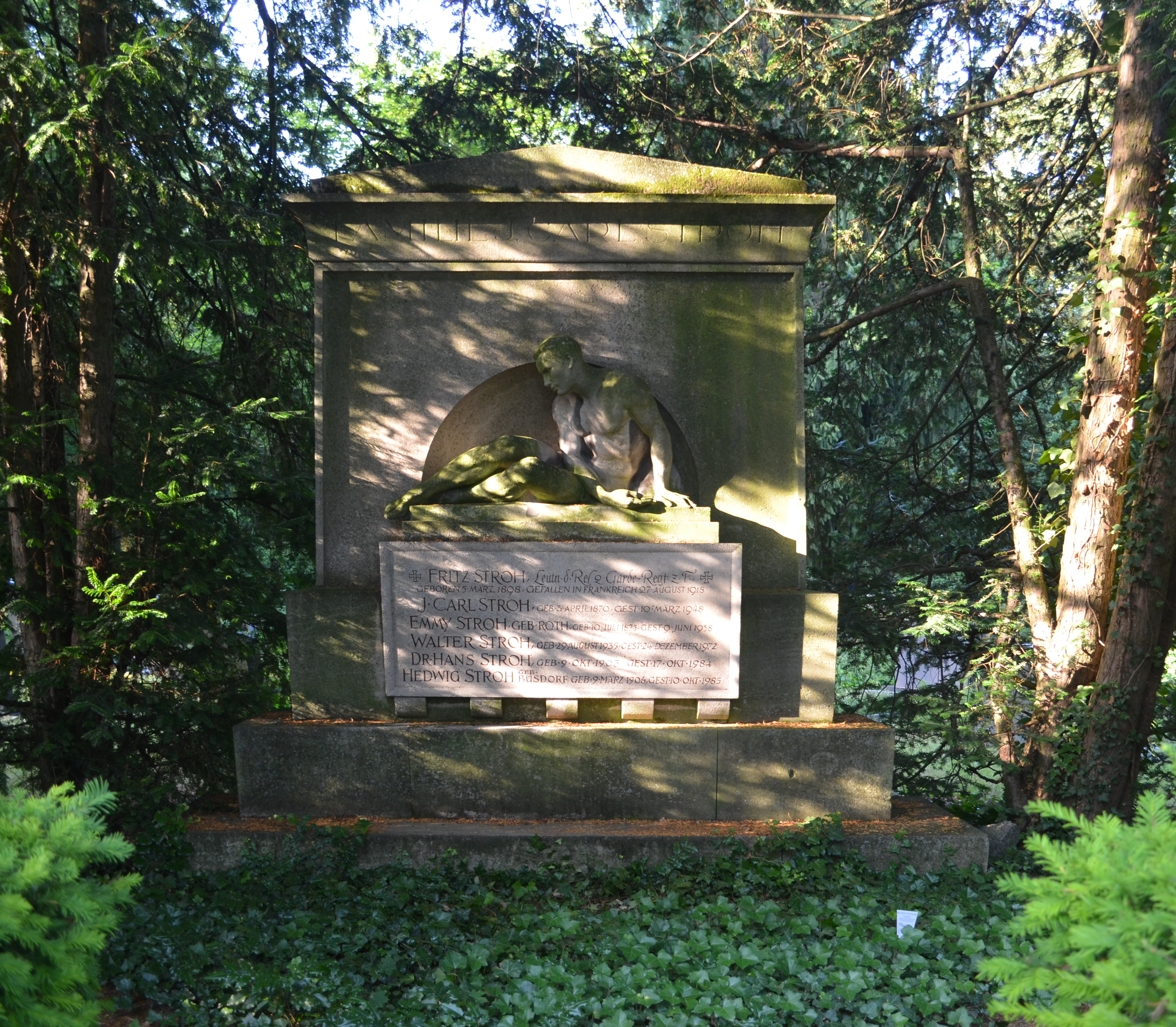 Offenbach, Alter Friedhof, Carl Stroh. Das Grabdenkmal ist ein Werk von Emil Hub.